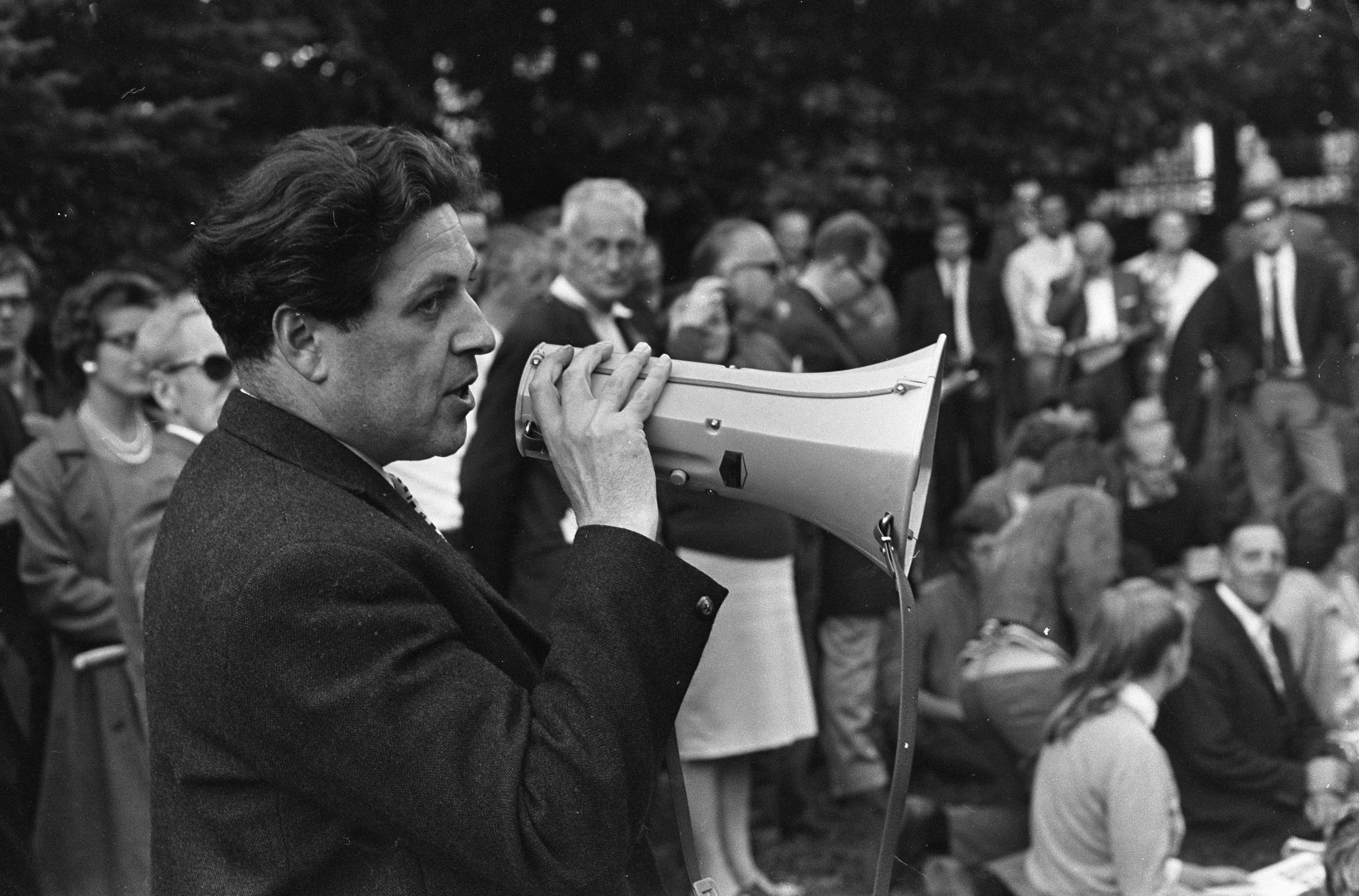 Collectie / Archief : Fotocollectie Anefo Reportage / Serie : [ onbekend ] Beschrijving : Door de PSP georganiseerde openbare discussie in het Vondelpark in Amsterdam; PSP-kamerlid Fred van der Spek met een megafoon Datum : 20 juli 1967 Locatie : Amsterdam, Noord-Holland Trefwoorden : bijeenkomsten, parken, parlementariërs, politieke partijen Persoonsnaam : Spek, Fred van der Instellingsnaam : PSP Fotograaf : Nijs, Jac. de / Anefo Auteursrechthebbende : Nationaal Archief Materiaalsoort : Negatief (zwart/wit) Nummer archiefinventaris : bekijk toegang 2.24.01.05 Bestanddeelnummer : 920-5217